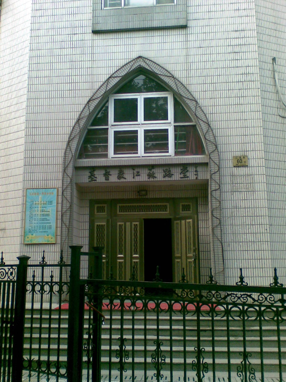 中文（中国大陆）: 南京江苏路基督教堂